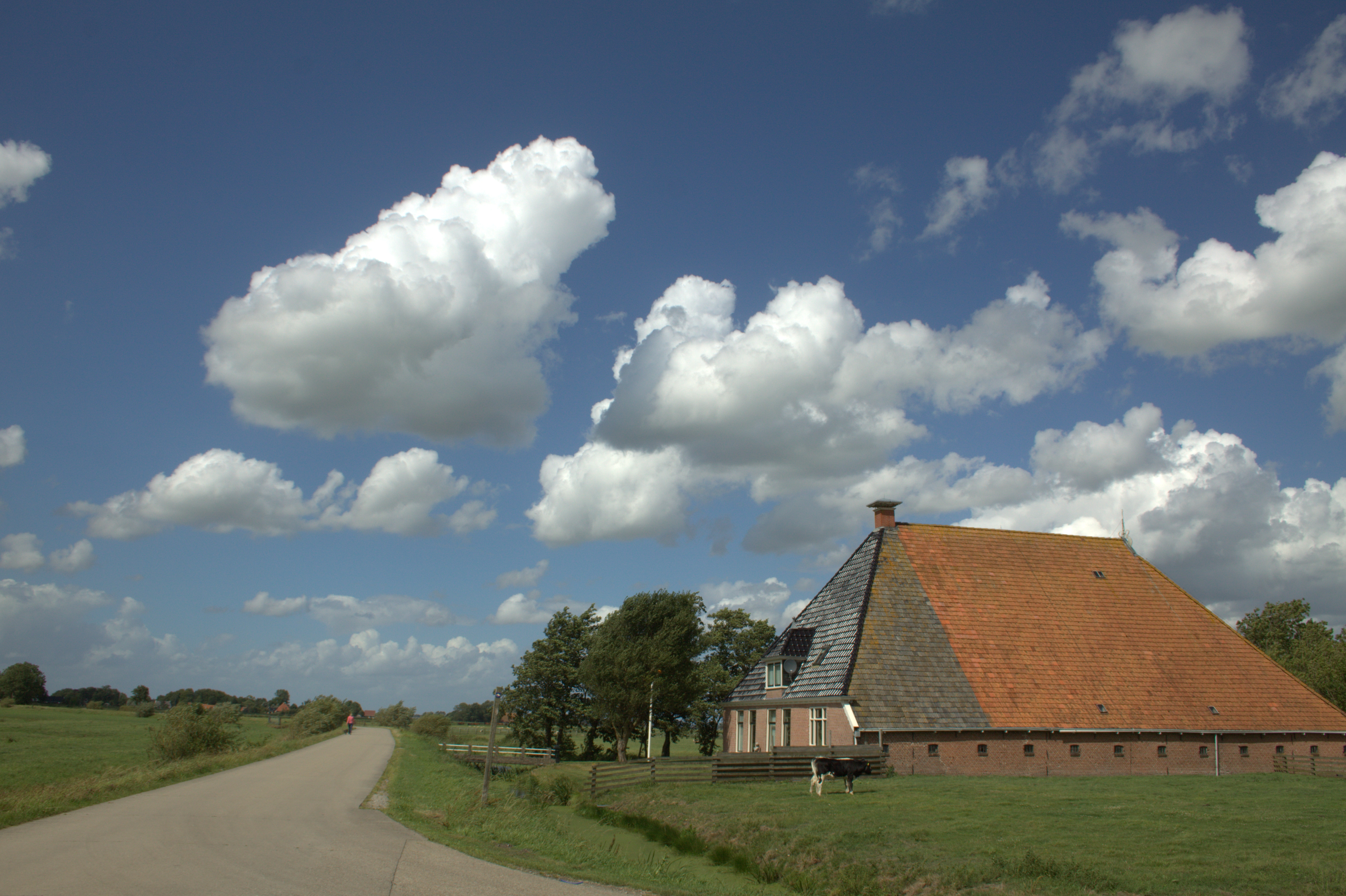 Lions een dorp in de Gemeente Litteneradeel in Friesland.